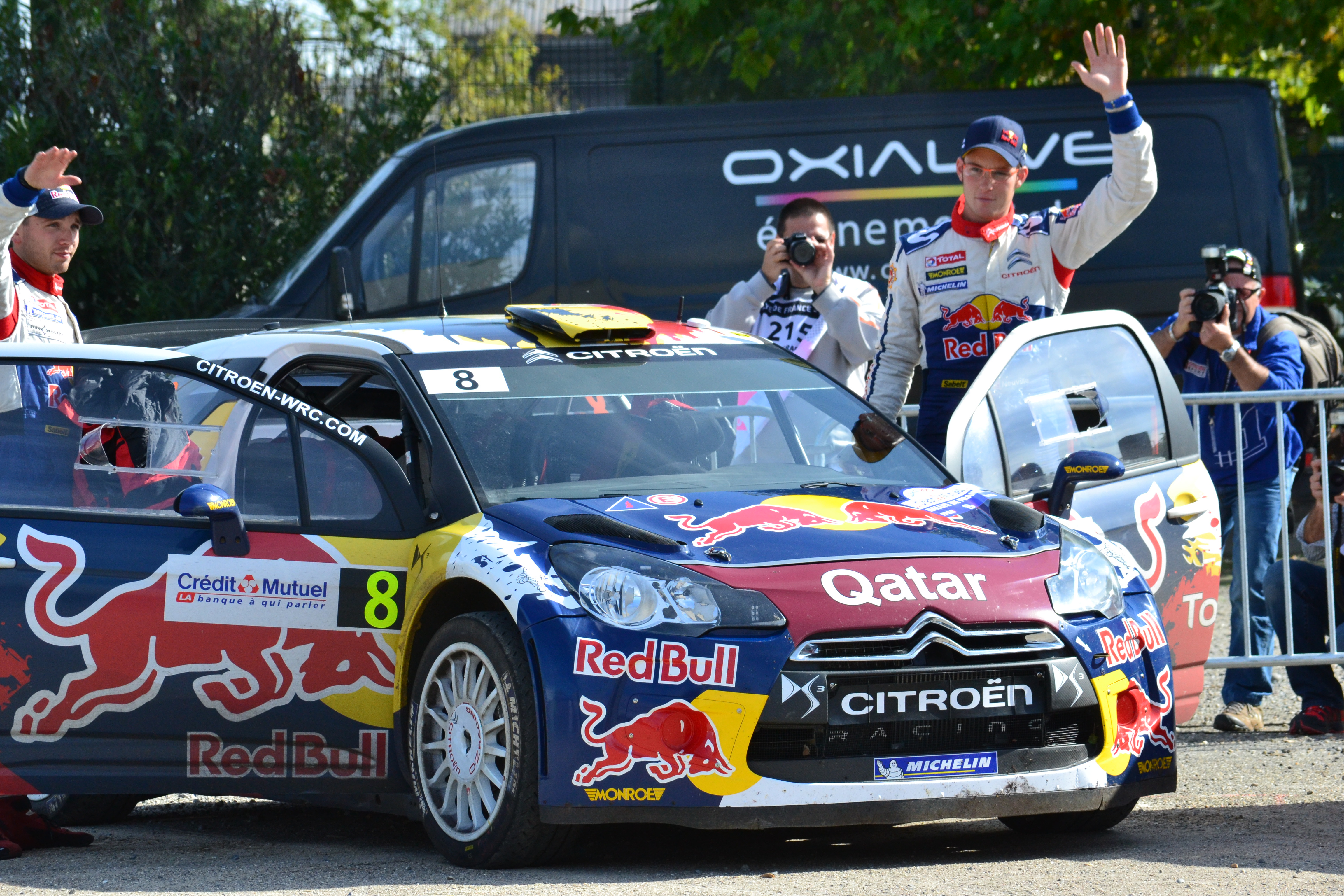 Thierry Neuville et Nicolas Gilsoul au parc d'assistance de Colmar durant le Rallye de France-Alsace 2012.